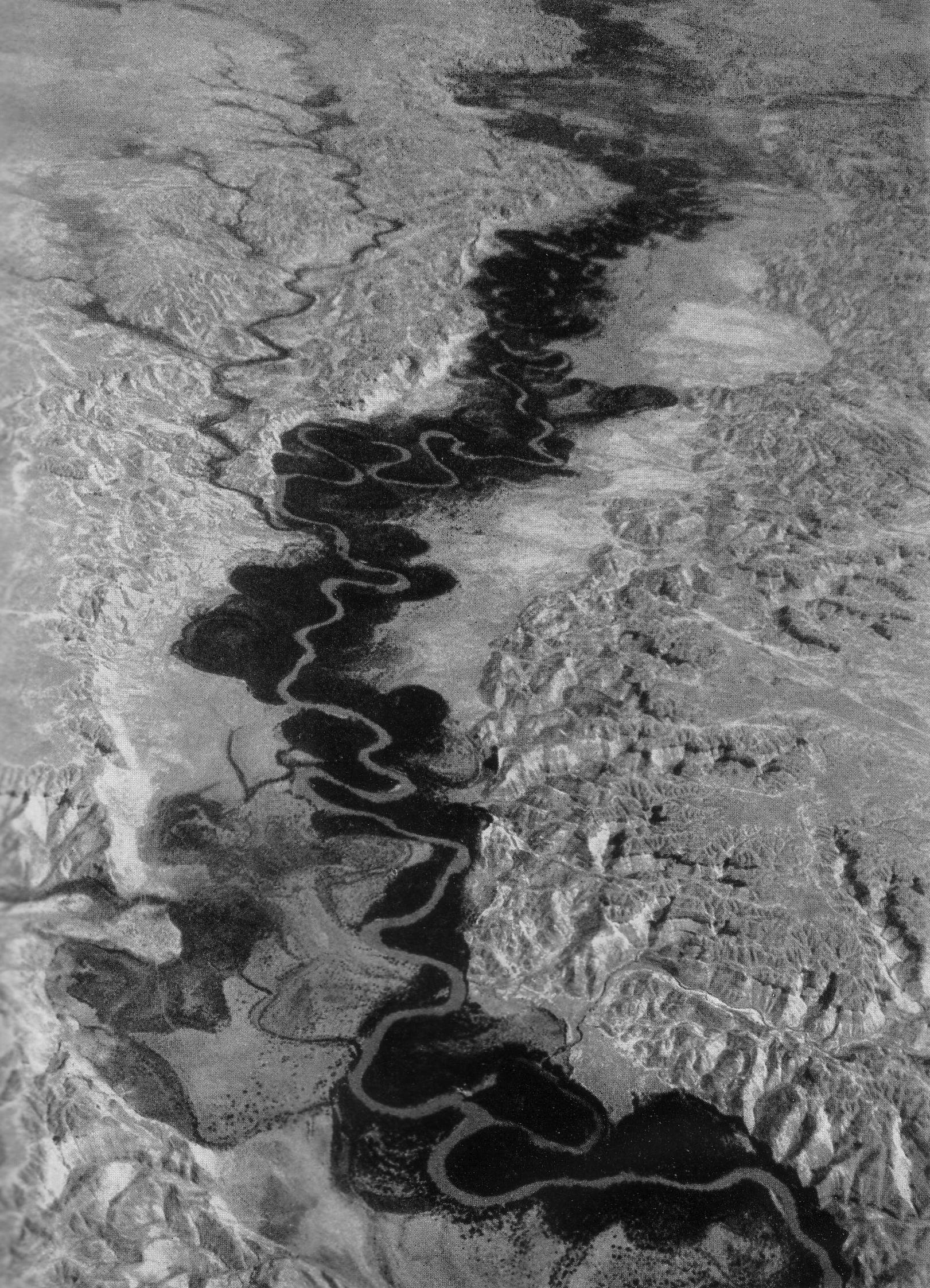 פיתולי הירדן במבט מן האוויר, 1938